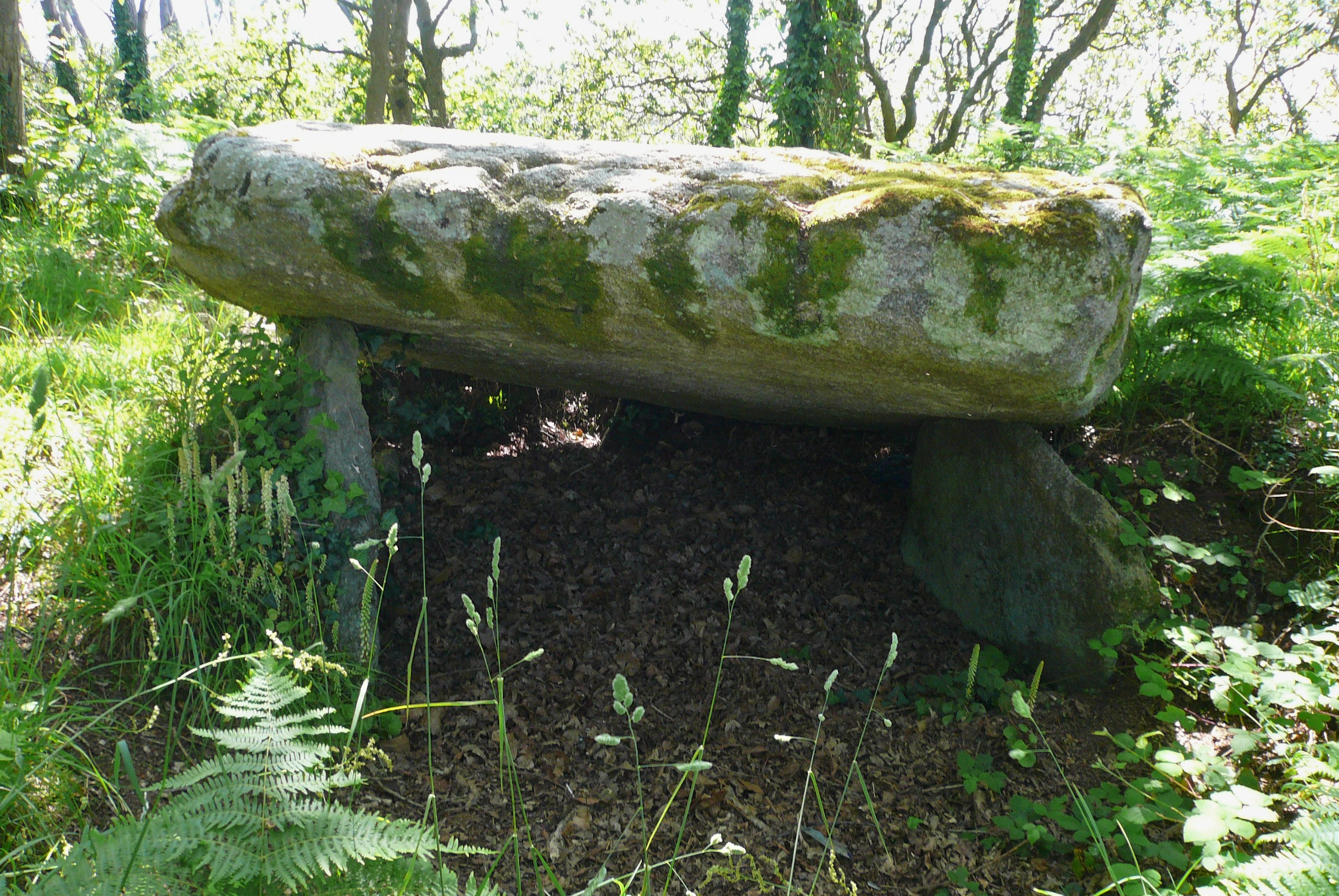 Le dolmen de Penker ar Bloaz en Plomeur, Finistère, Bretagne, France.